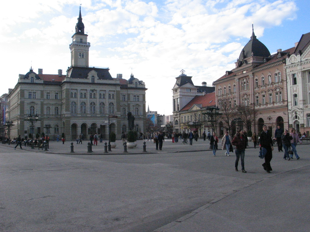 Опис: Трг Слободе у Новом Саду Аутор: Ненад Шегуљев